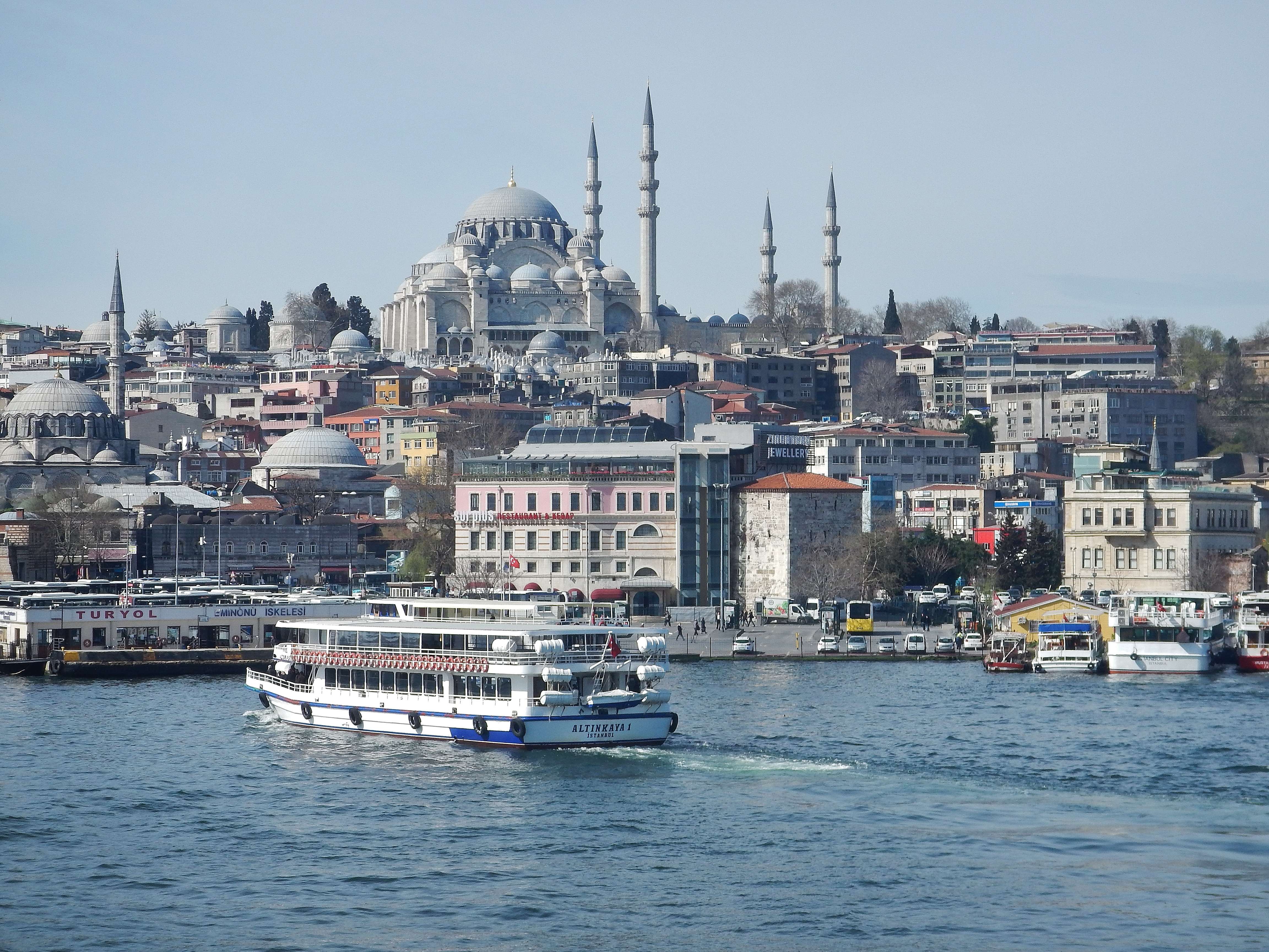 View to Süleymaniye Camii, Süleymaniye-Moschee